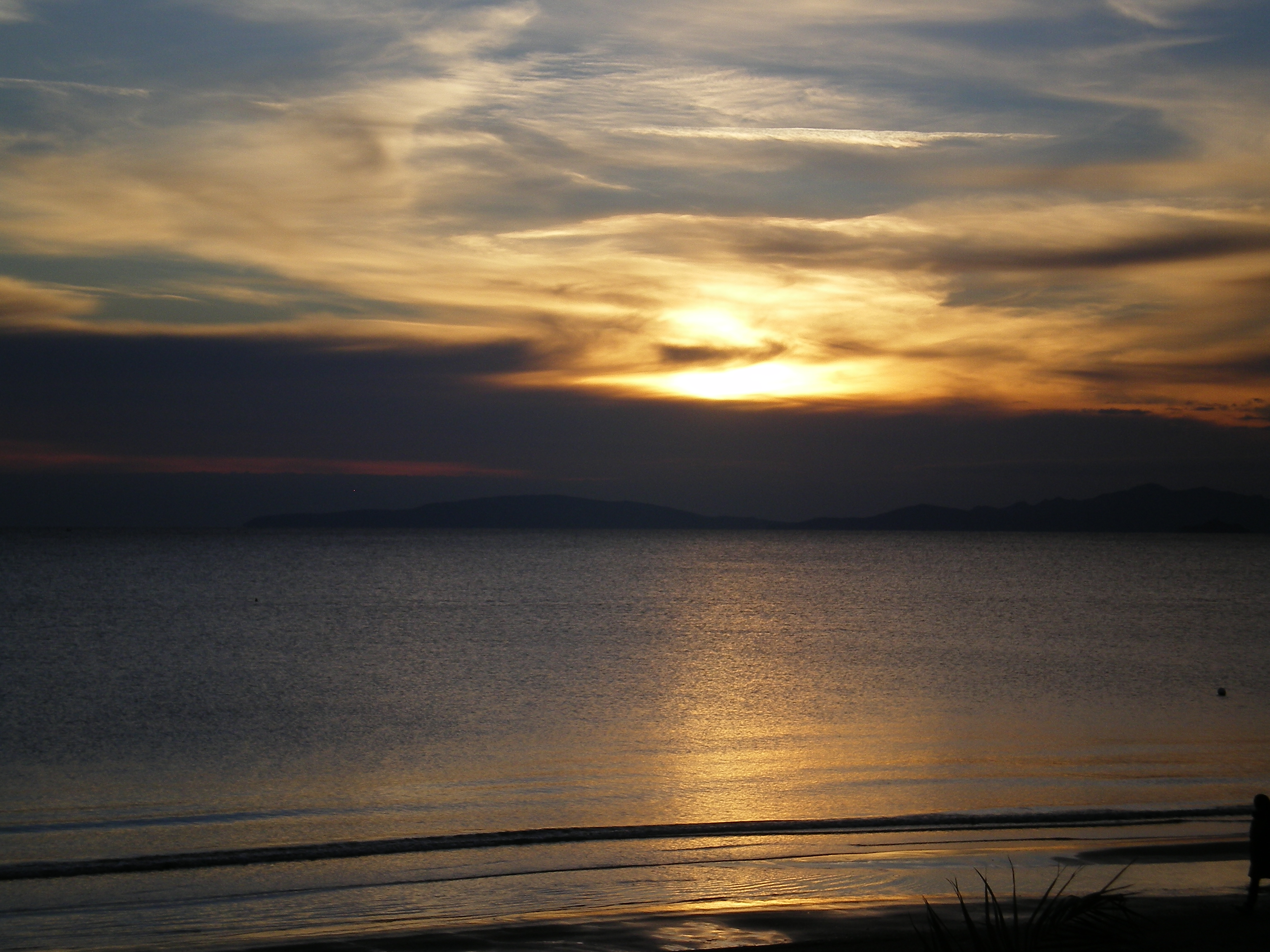 Tramonto sull'Isola d'Elba da Pratoranieri, Follonica